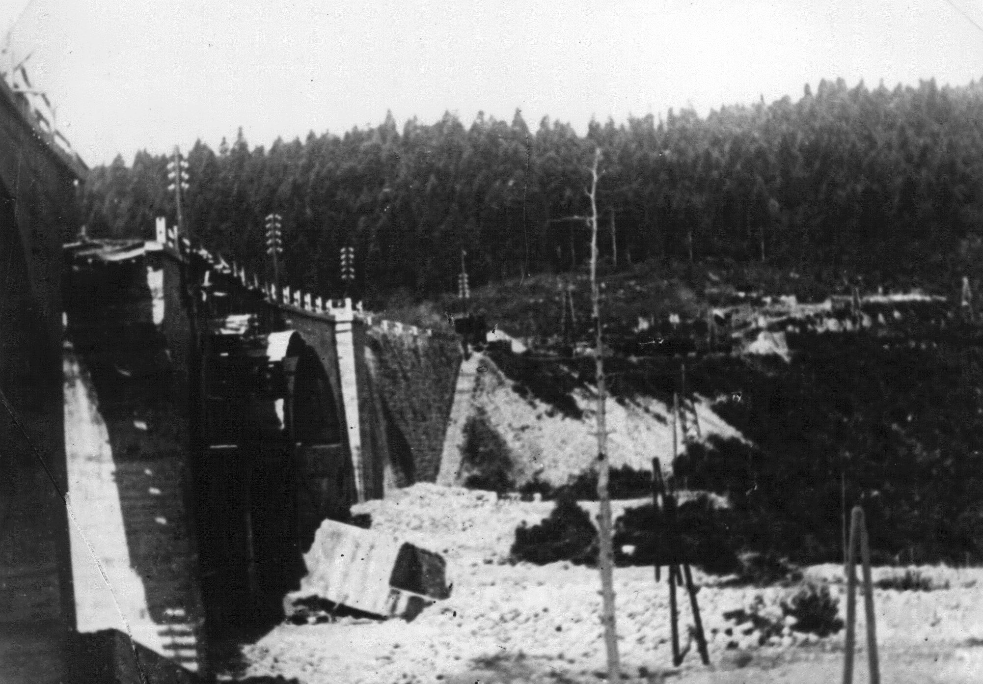 Porušen Štampetov most, ki so ga minirali borci XV. divizije.